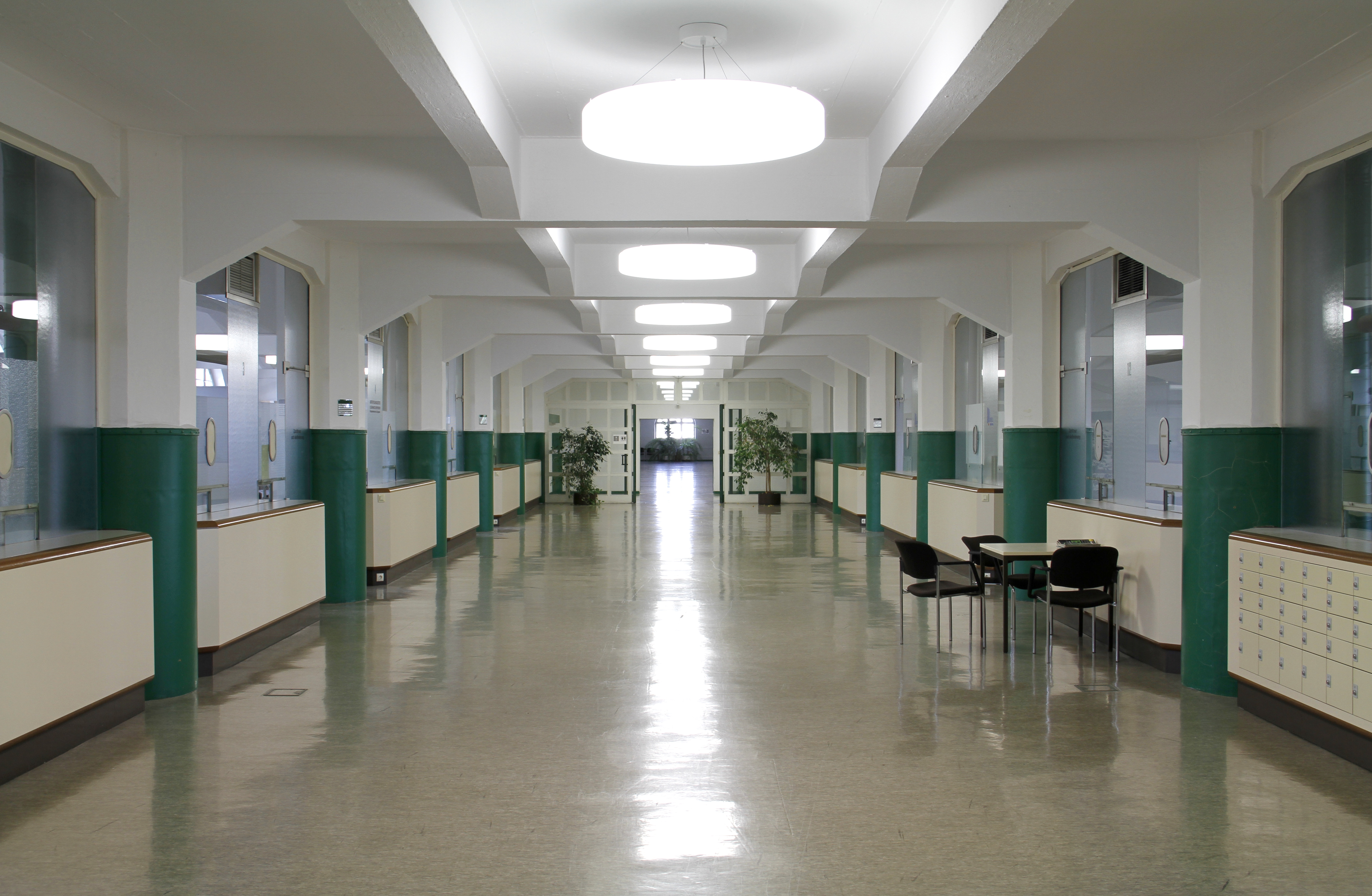 Hauptzollamt München, ehemalige Schalter im ersten Obergeschoss, eingebaut in die Lagerhalle, deren Säulen- und Trägerstruktur sichtbar ist.